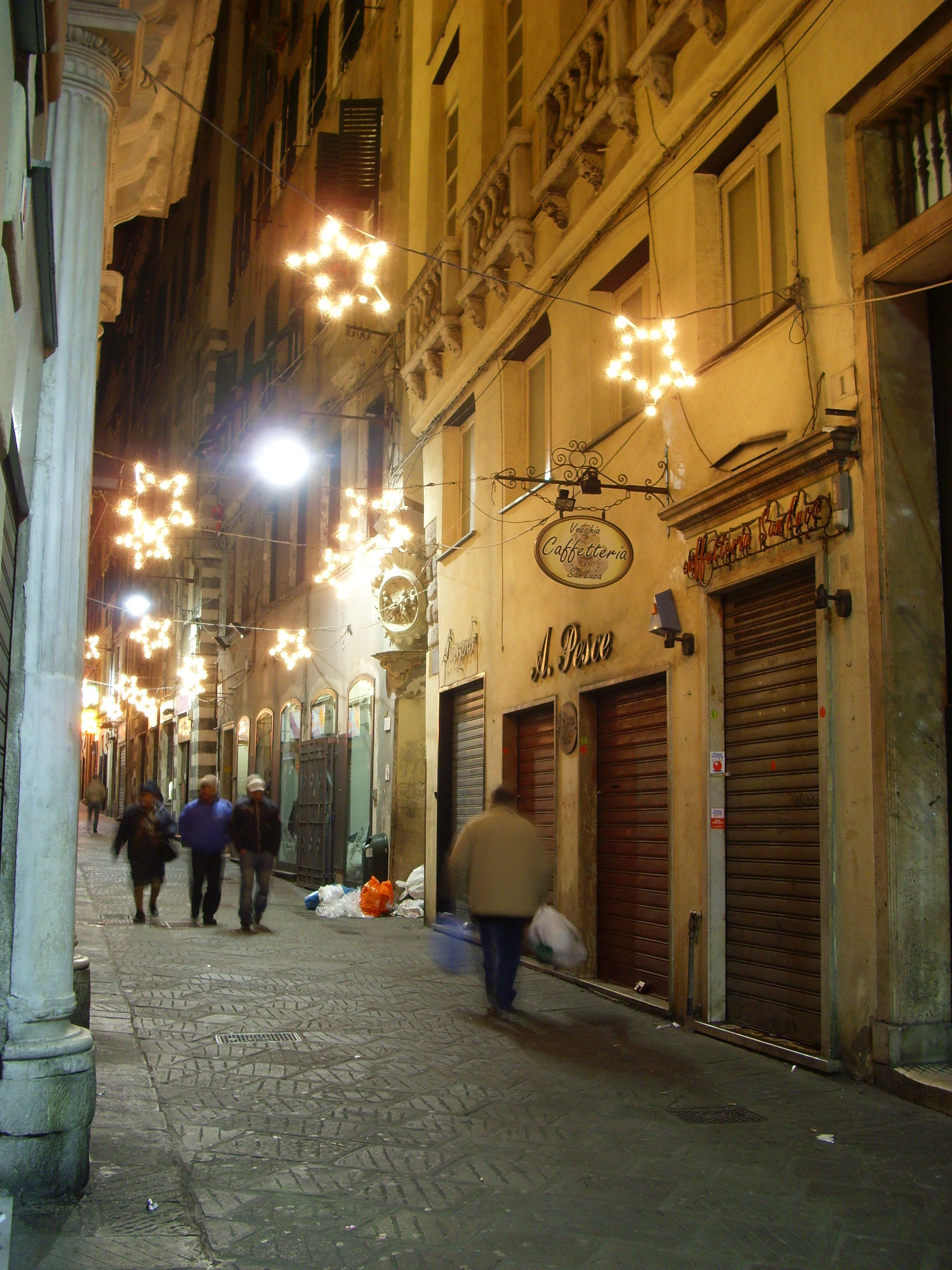 Strada genovese posta nelle immediate vicinanze di Sottoripa (quartiere di Genova).